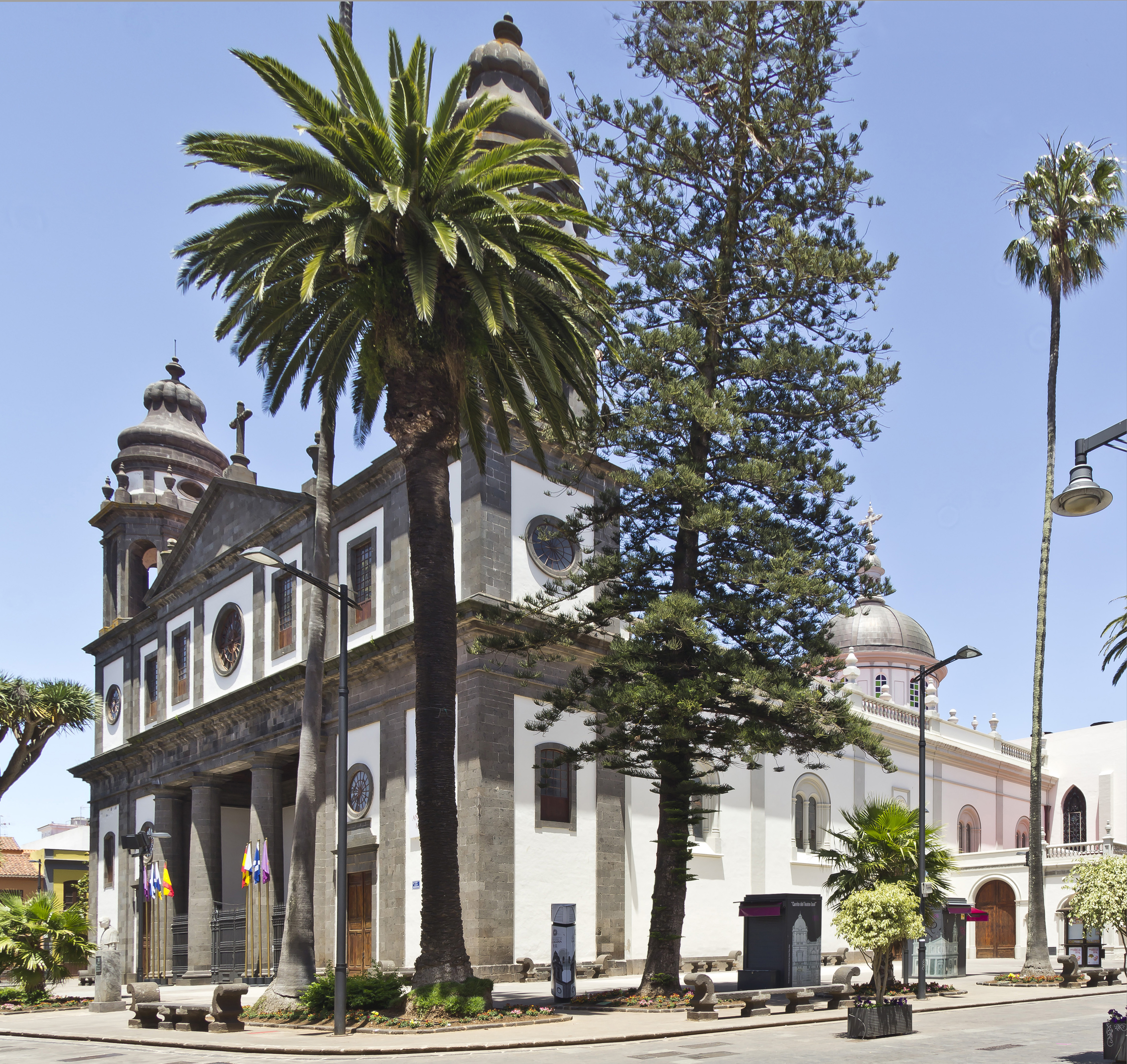 Iglesia Catedral La Laguna